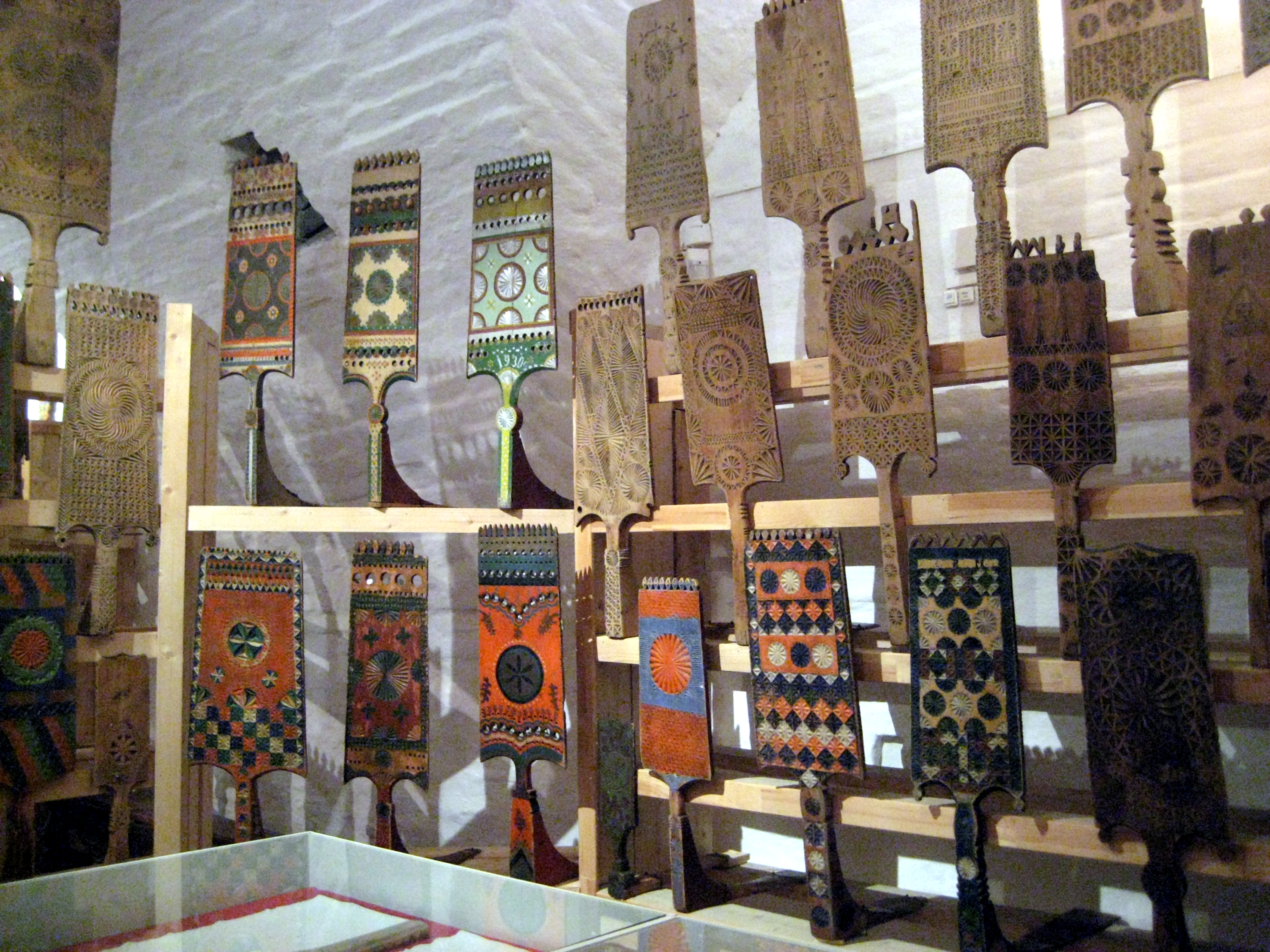 Коллекция русских прялок. Музей крестьянского быта, Ферапонтов монастырь